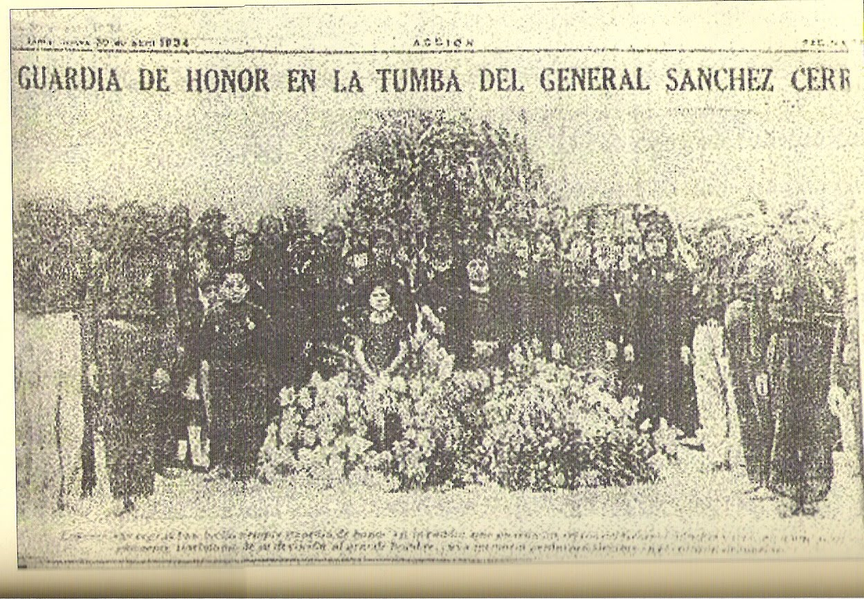 Guardia de Honor, 1934